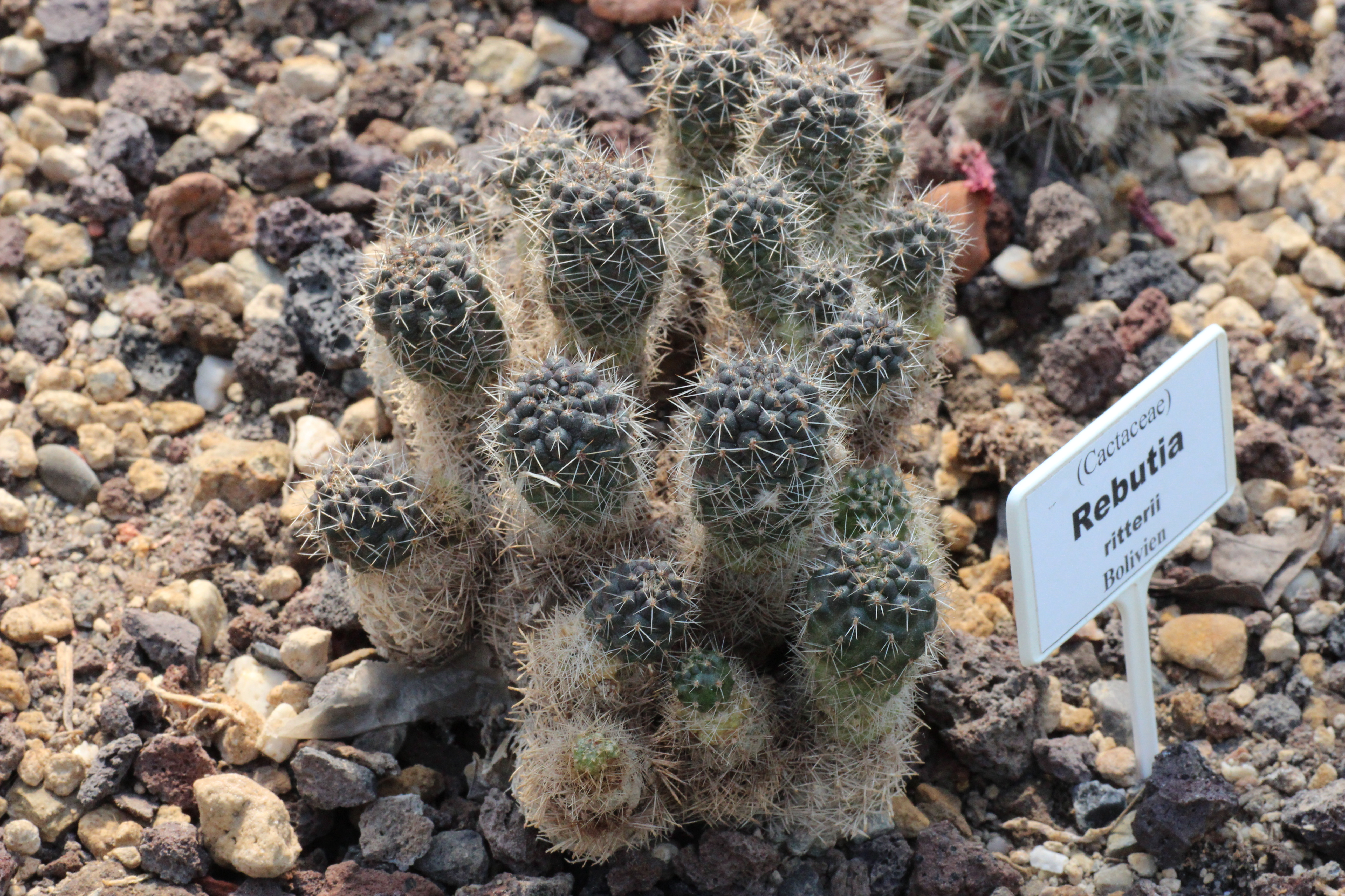 Rebutia ritteri im Botanischen Garten Kassel